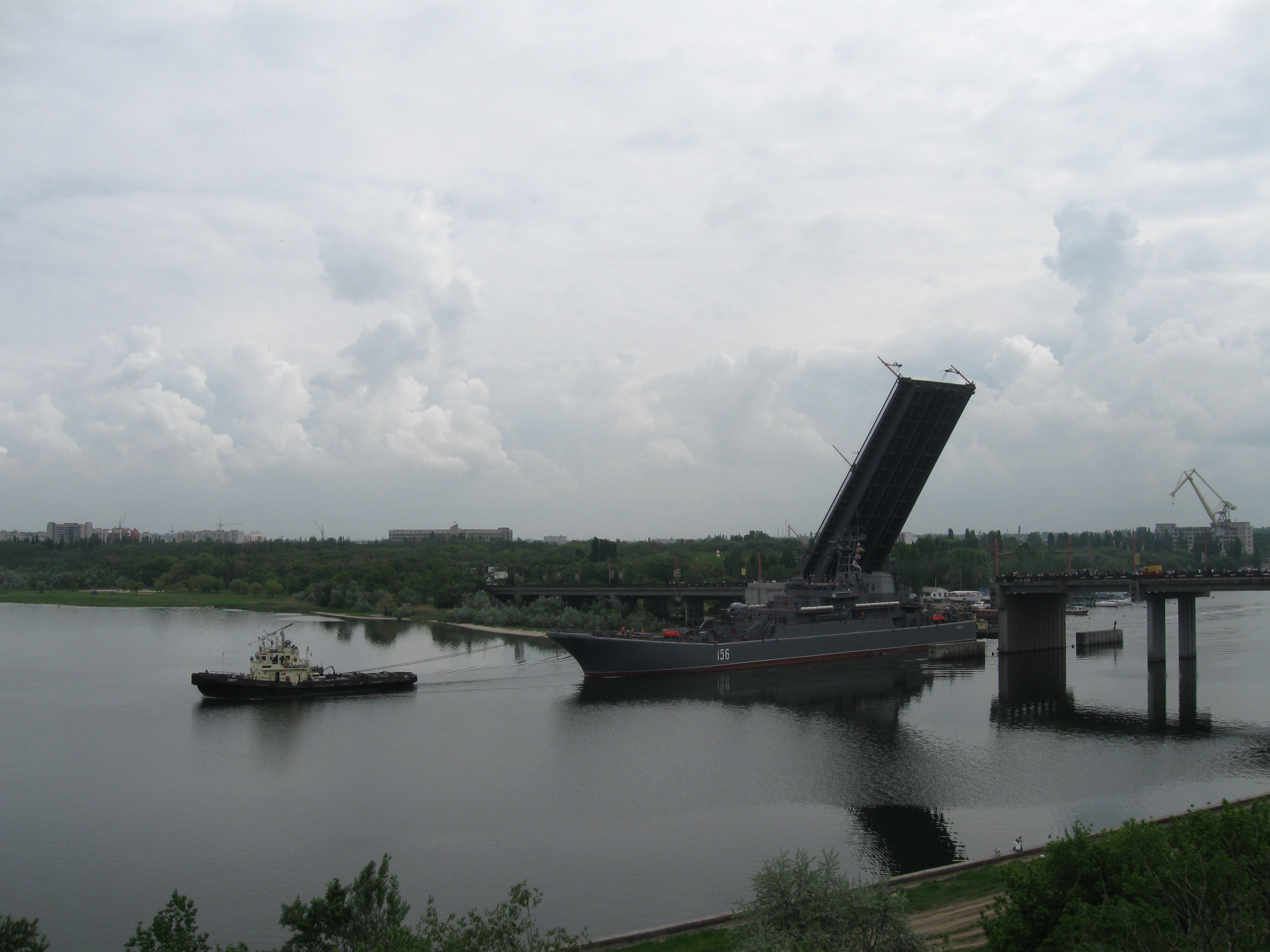 ВДК Ямал покидає Миколаїв і вирушае до Севастополя